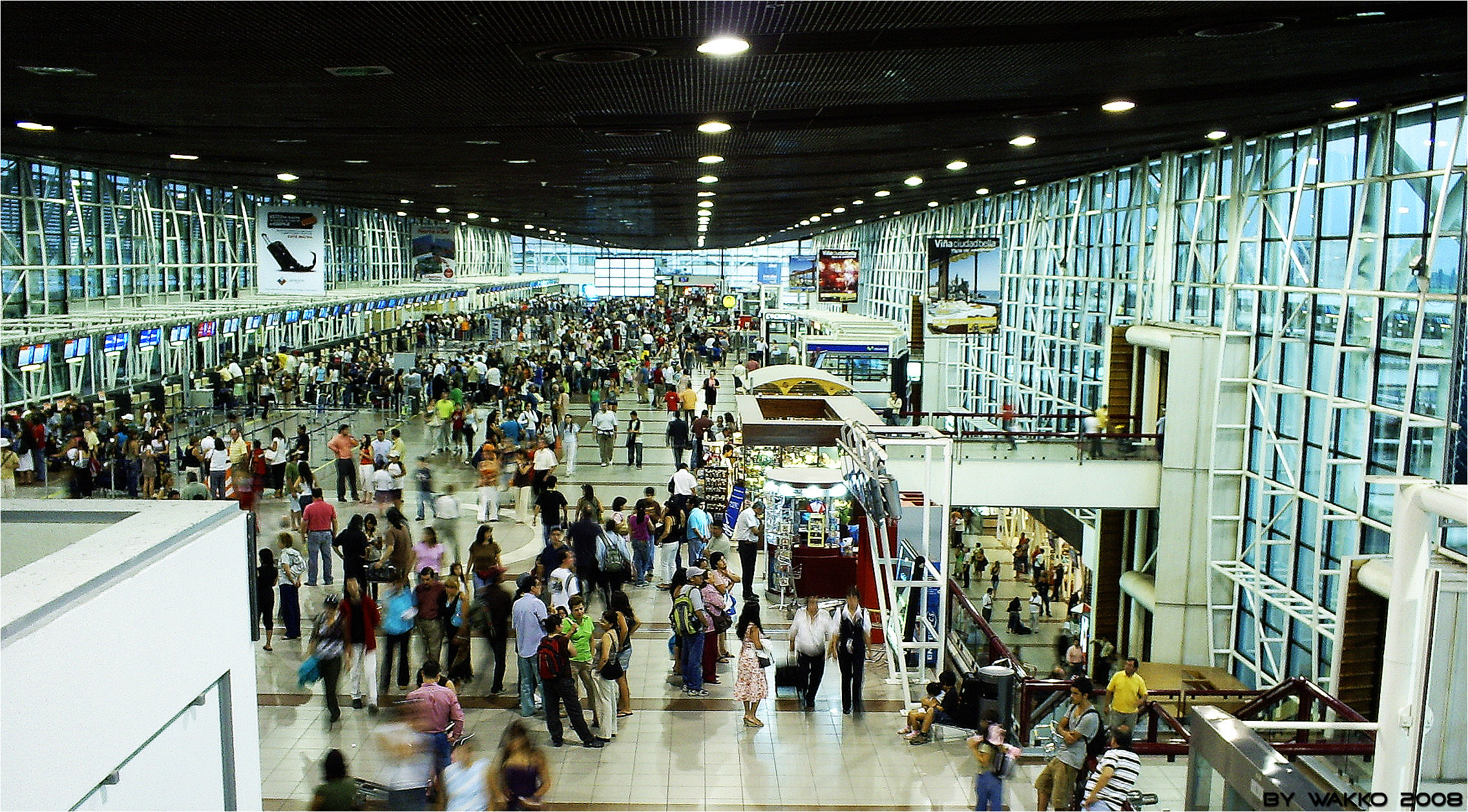 la gente que espera sus respectivos vuelos se da vueltas por las dependencias del aeropuerto de santiago (SCL). pudahuel, región metropolitana, chile.